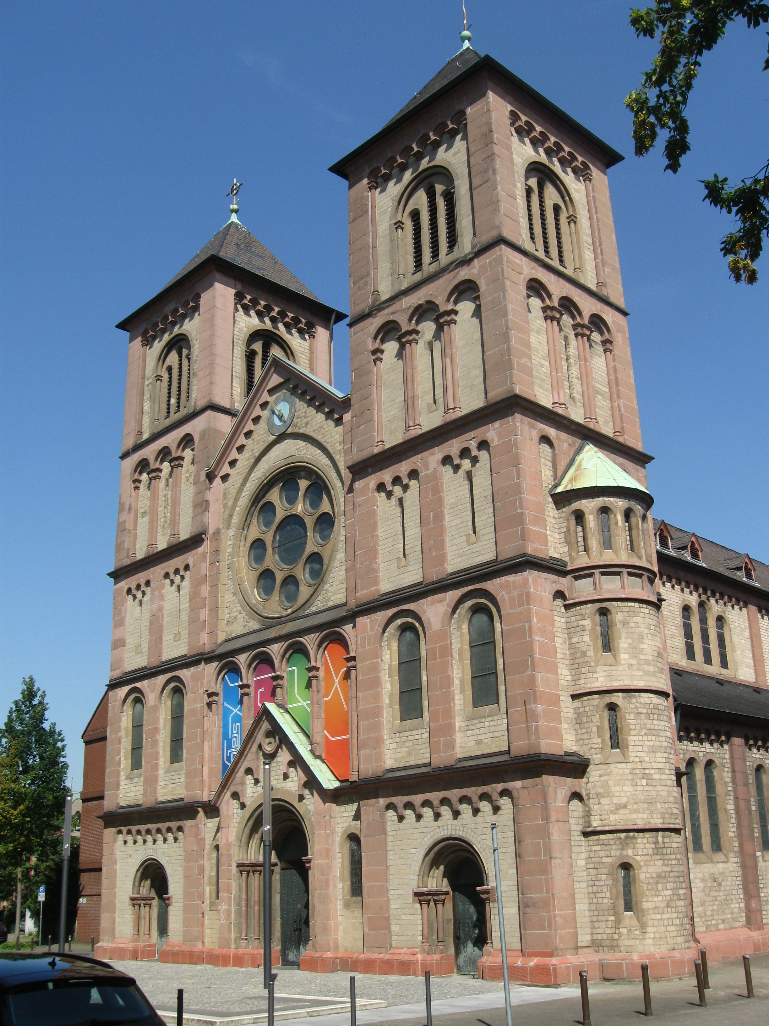 Liebfrauenkirche (röm.-kath.) in Gelsenkirchen-Neustadt (Neustadtplatz)